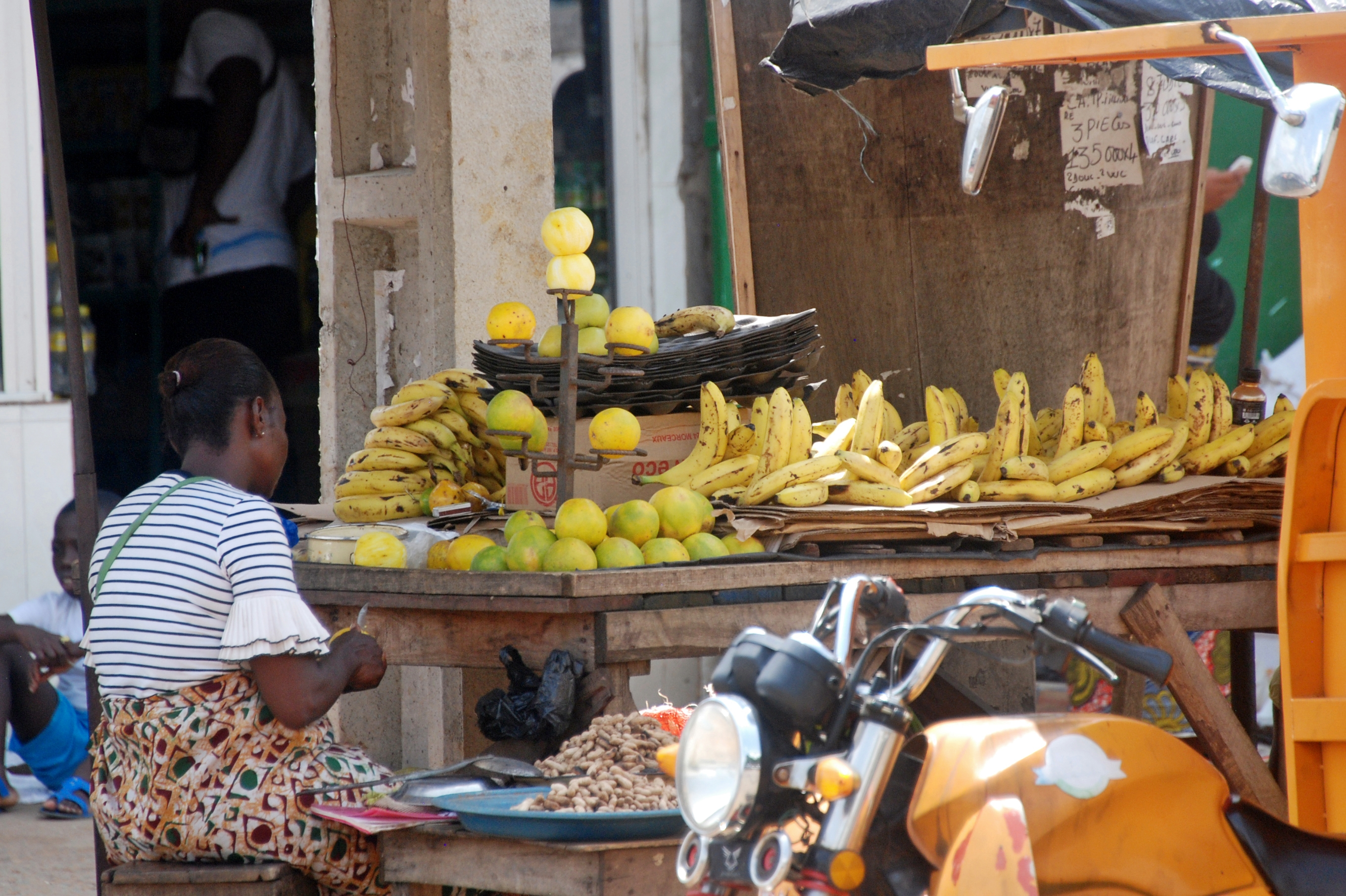 une vendeuse de fruits dans la ville d'Abidjan This is an image of "African people at work" from Ivory Coast